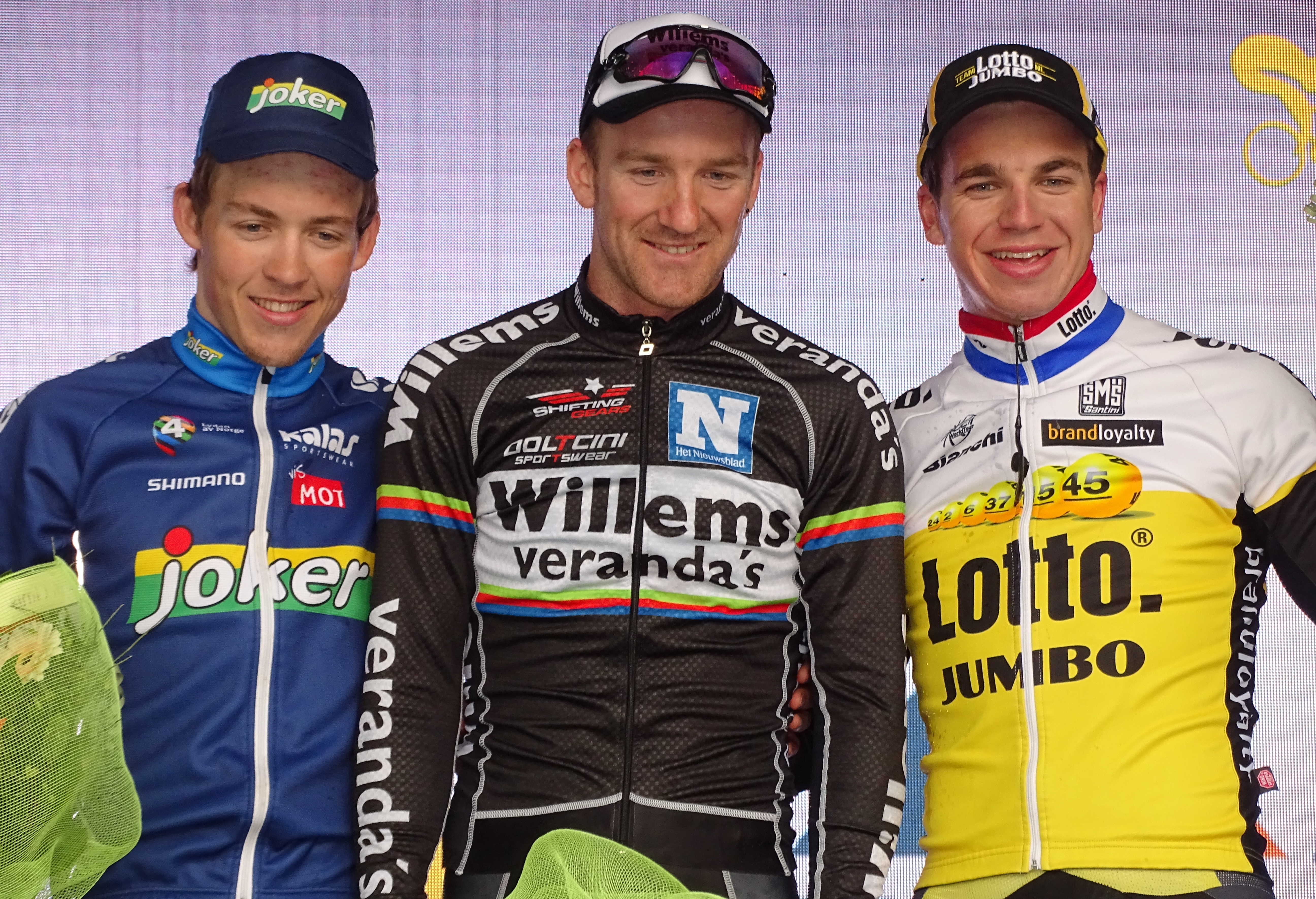 Reportage réalisé le mercredi 18 mars à l'occasion de l'arrivée de la Nokere Koerse 2015 à Nokere (Kruishoutem), Belgique.